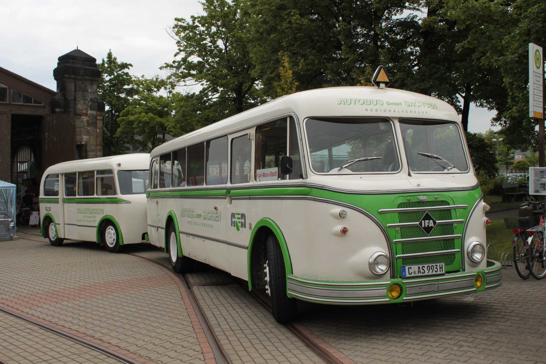 IFA H6B mit Personenanhänger vom Typ HW80 (W701).